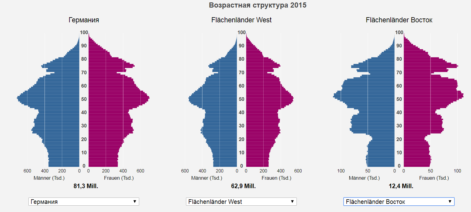 Половозрастная струтура 2015